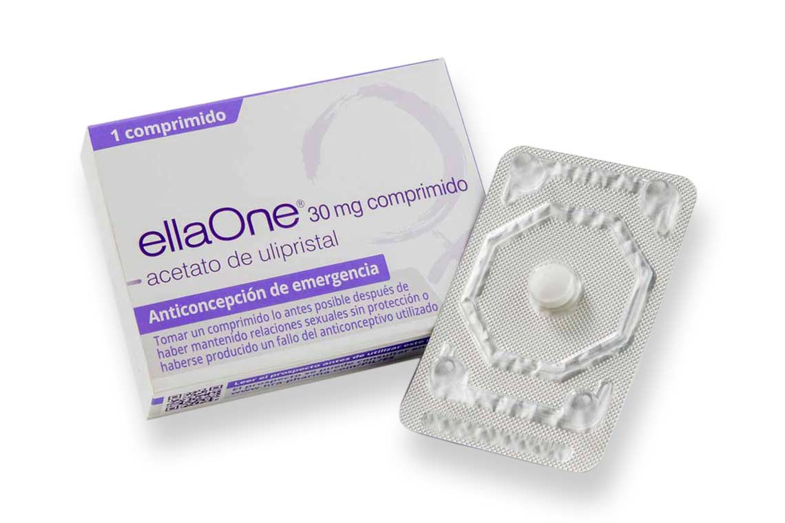 Blister de la píldora del día después de la marca ellaOne